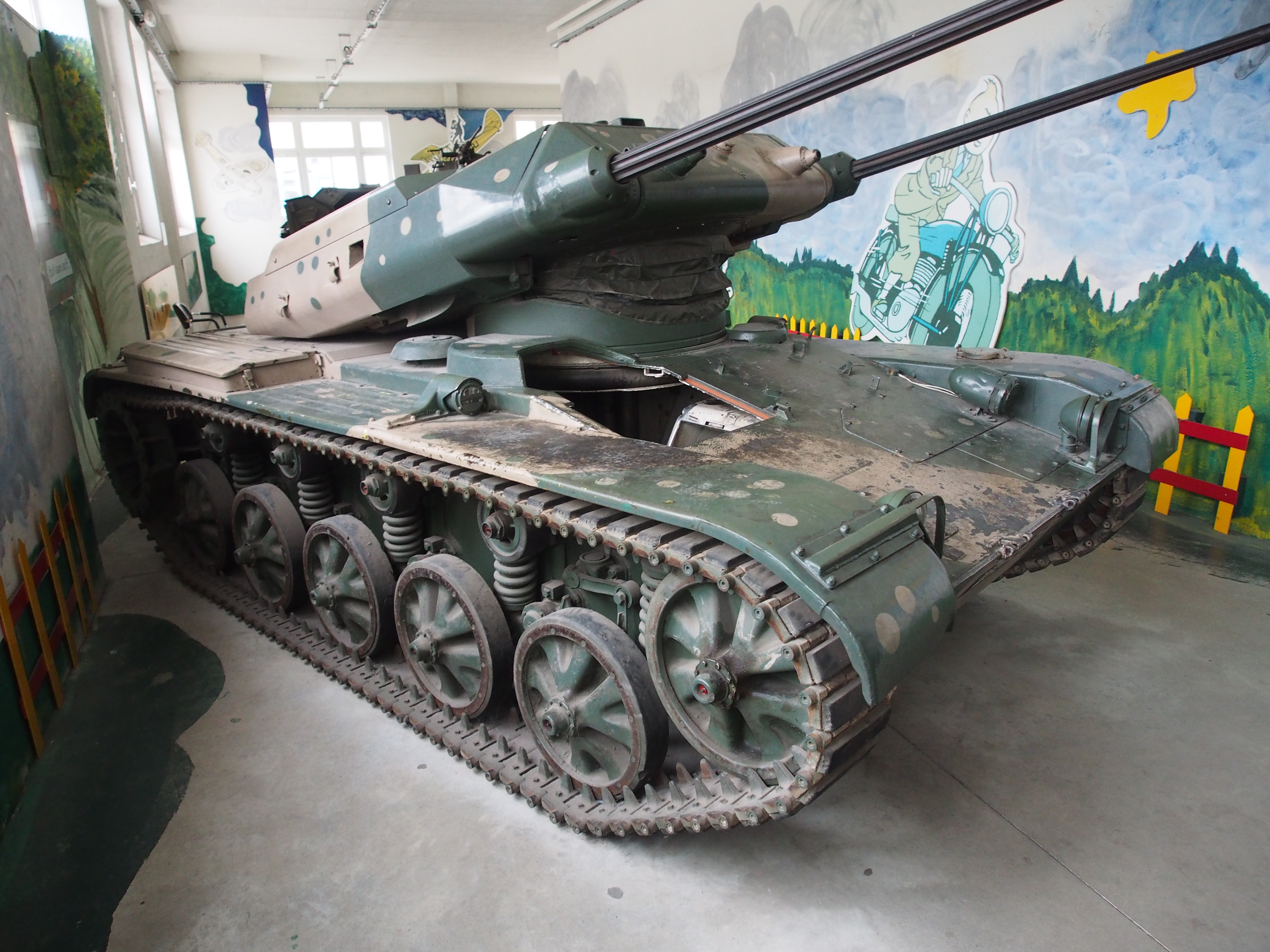 Engin Léger de Combat EVEN. Photographed in the Musée des Blindés, France.